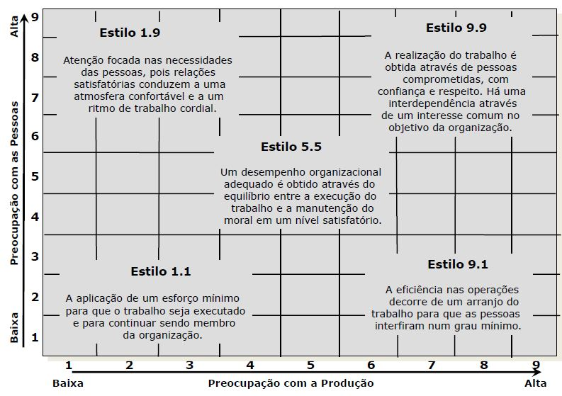 Modelo managerial grid